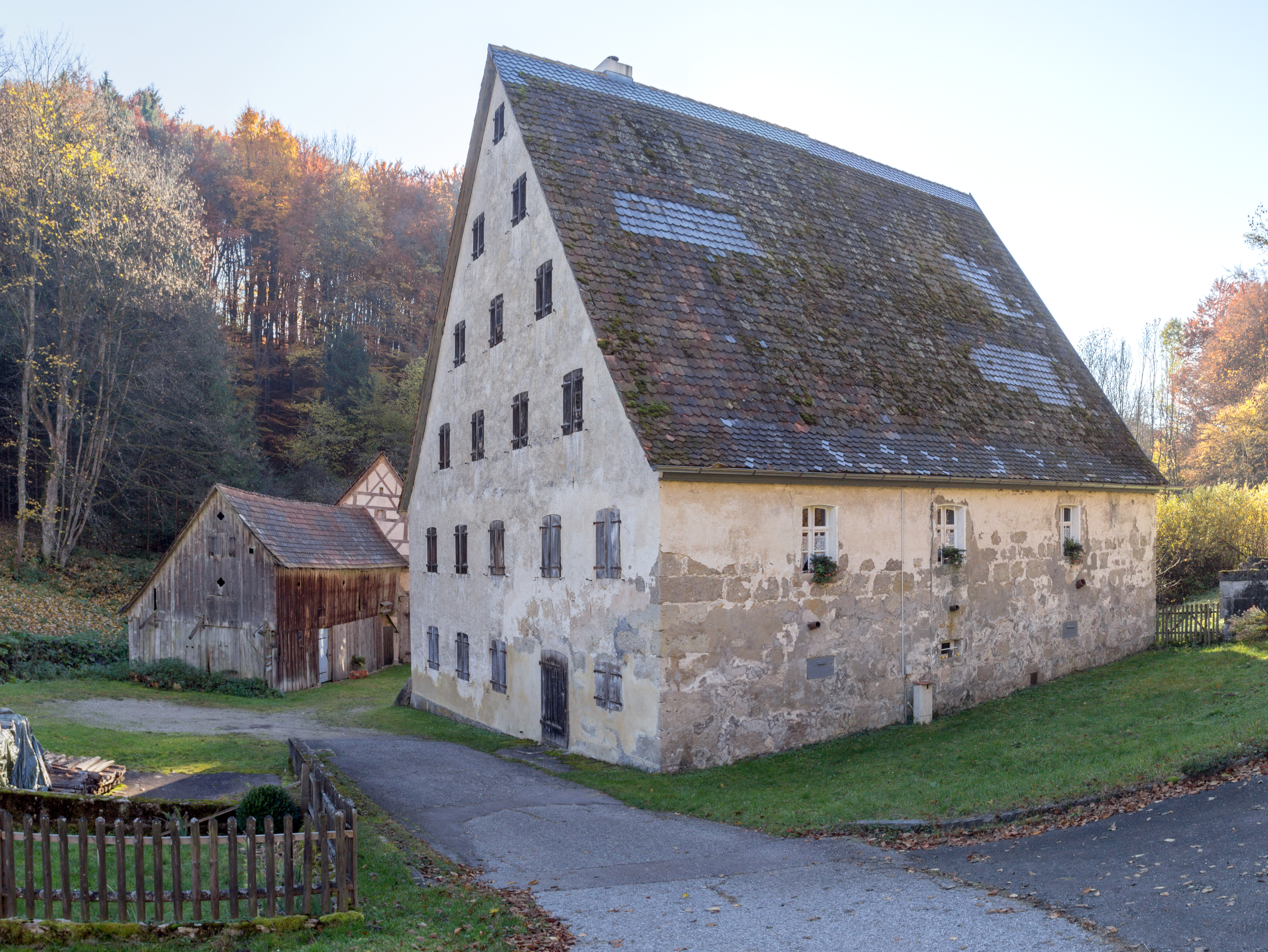 Mühlengehöft, Eratsmühle, Lauterhofen